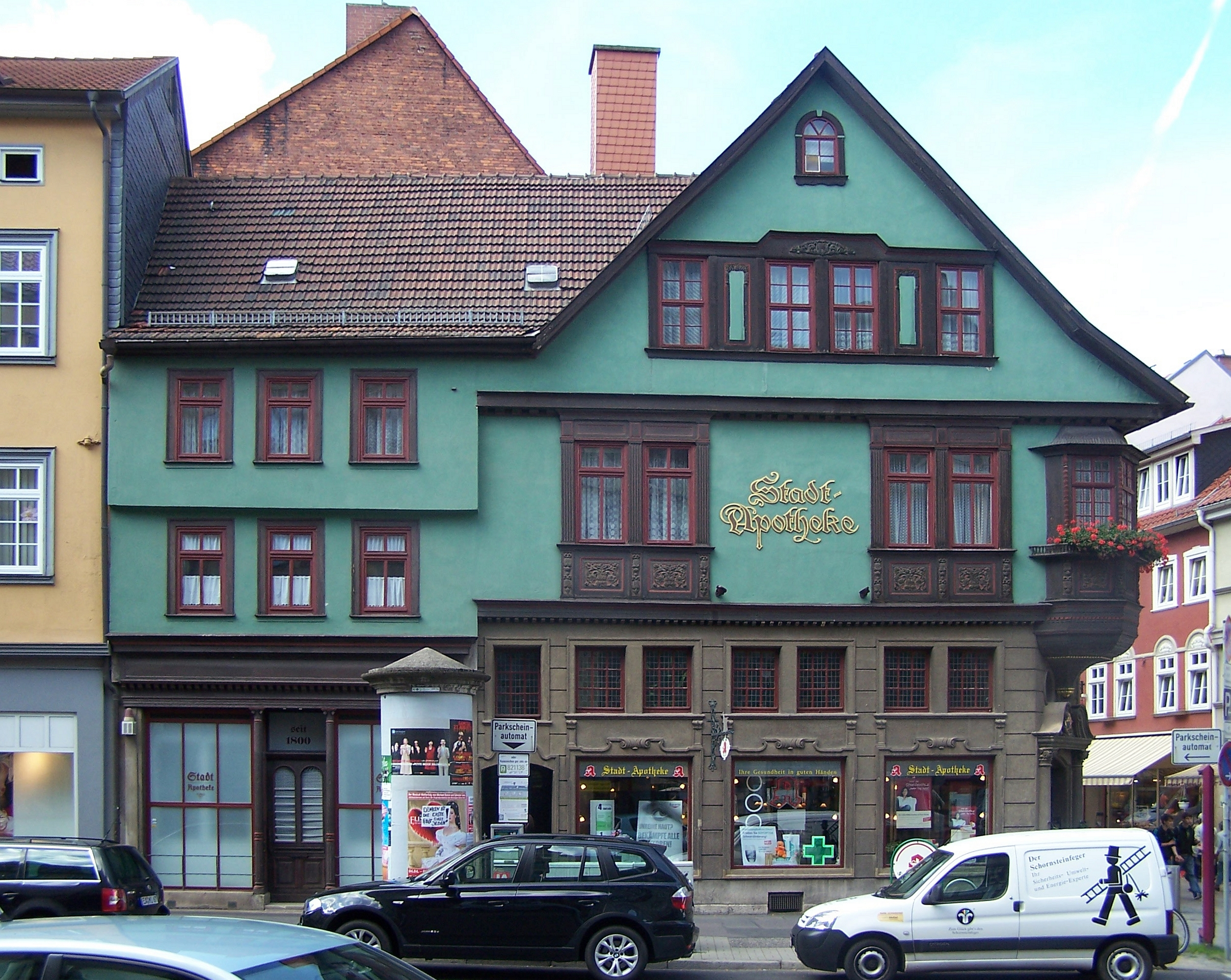 Das malerische Gebäude der Stadtapotheke in Eisenach Ecke Karlstraße und Karlsplatz.